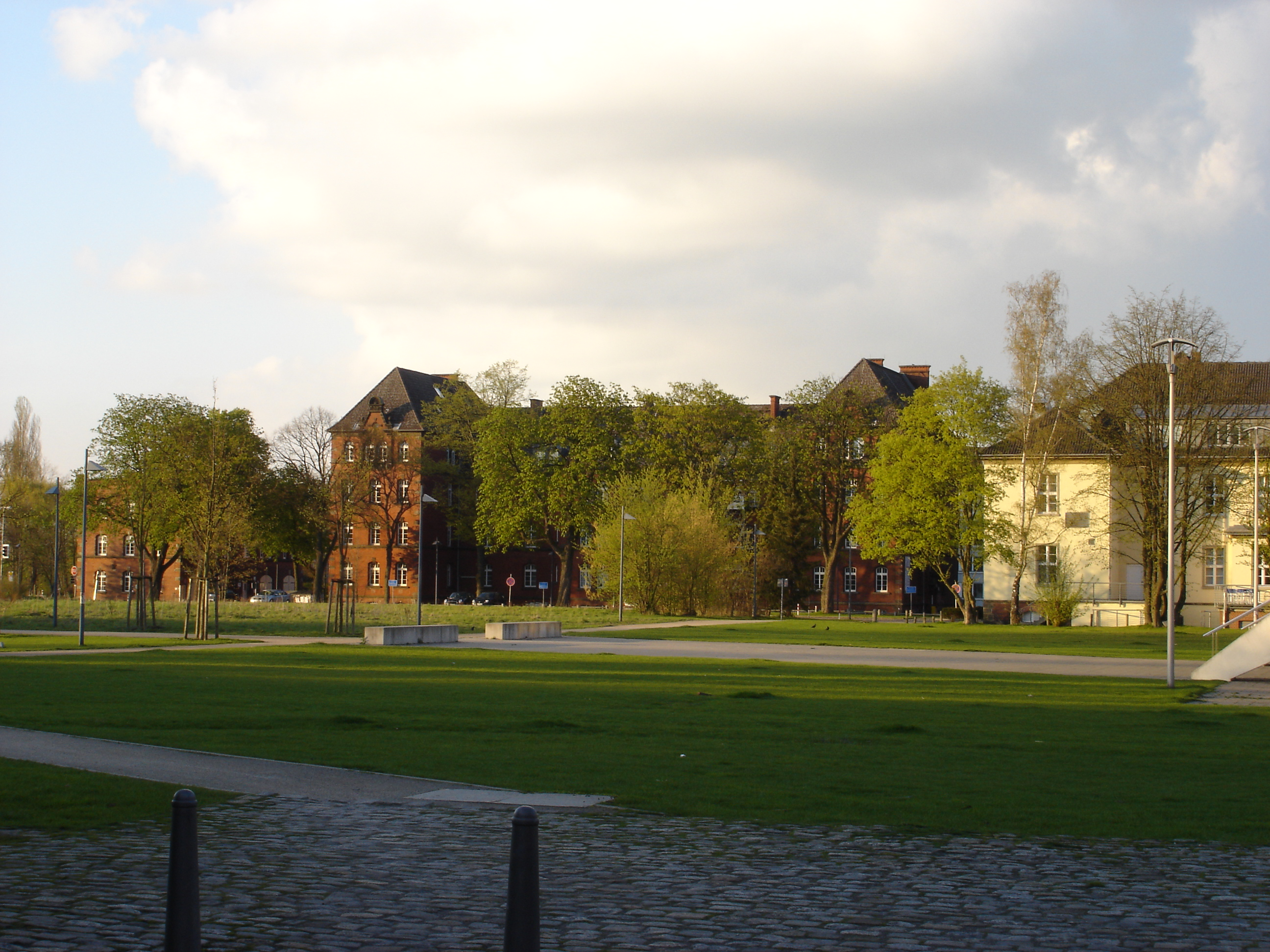 Panorama in nordöstlicher Richtung über den Leonardo-Campus in Münster, Westfalen, Deutschland